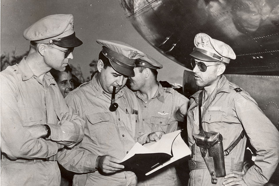 Da sinistra: il generale Lauris Norstad, capo di stato maggiore della Twentieth Air Force, il generale Curtis LeMay, comandante del XXI Bomber Command, il generale Thomas S. Power, comandante del 314th Bomb Wing. I tre alti ufficiali dell'USAAF esaminano i rapporti dell'incursione su Tokyo del 9-10 marzo 1945.